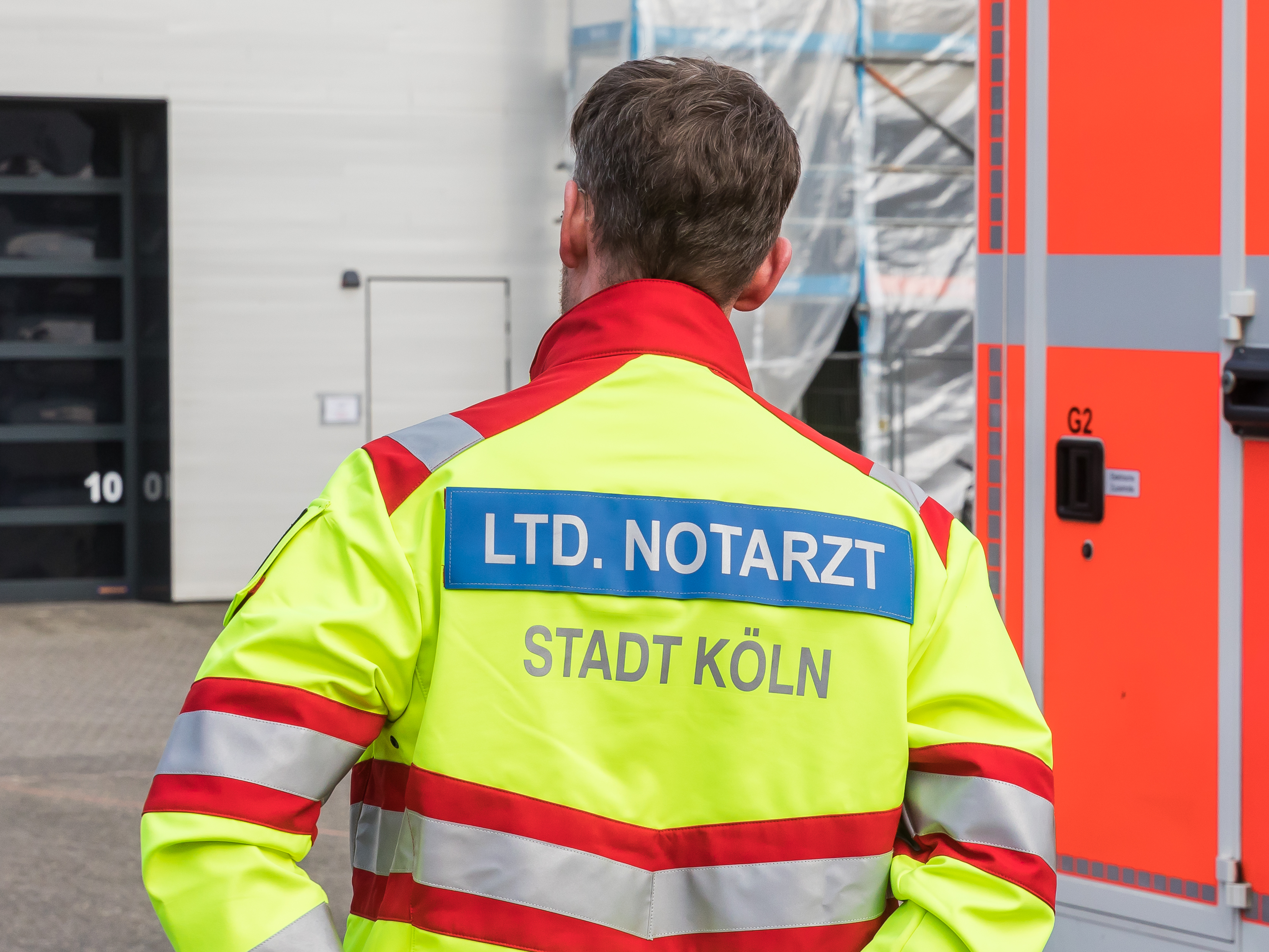 Rettungsdienst der Stadt Köln - Anlegen der Schutzausstattungen im Hof der Feuerwache 5, Köln-Weidenpesch Foto: Leitender Notarzt der Stadt Köln